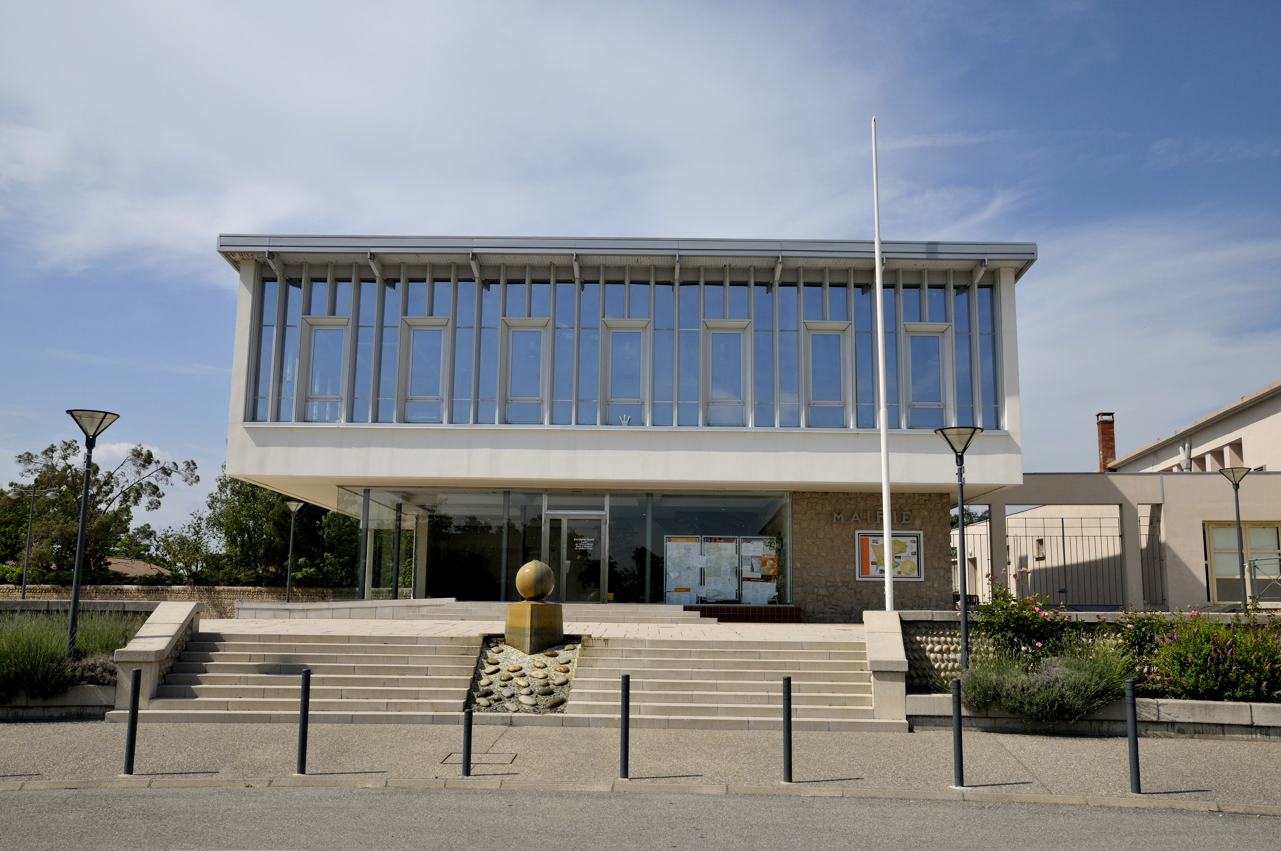 la mairie